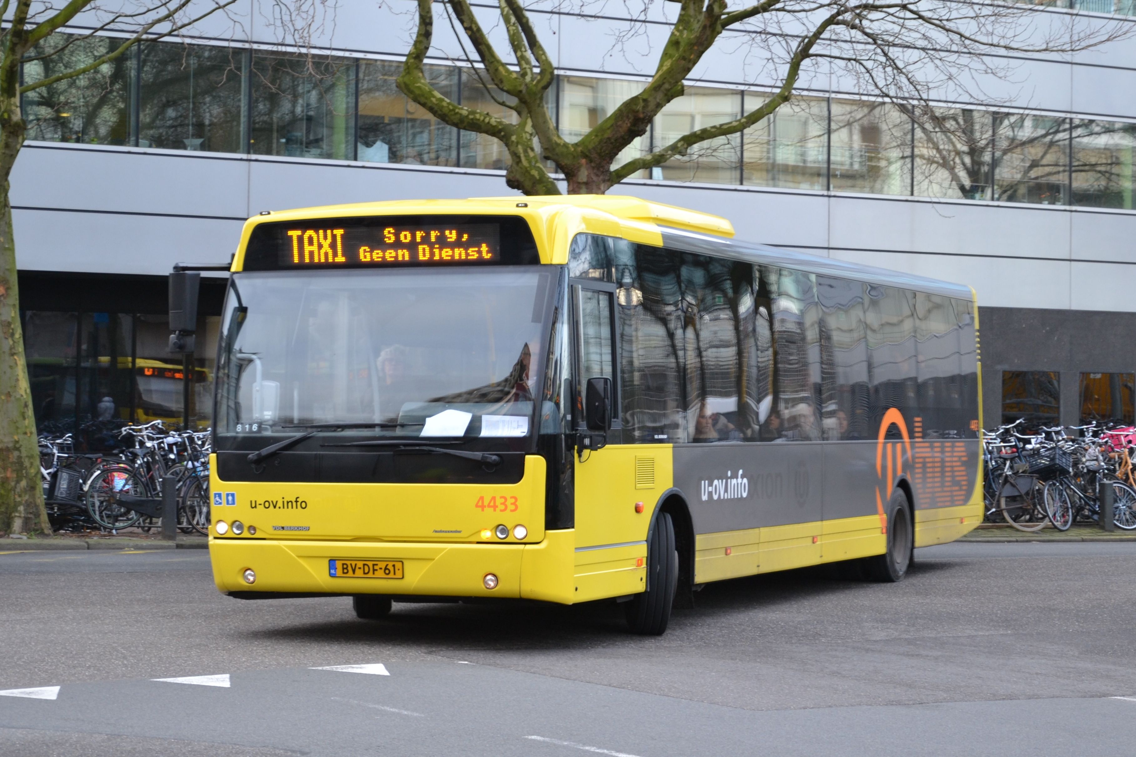 Qbuzz 4433, de ex-3191, als POD-bus op het busstation Centrumzijde